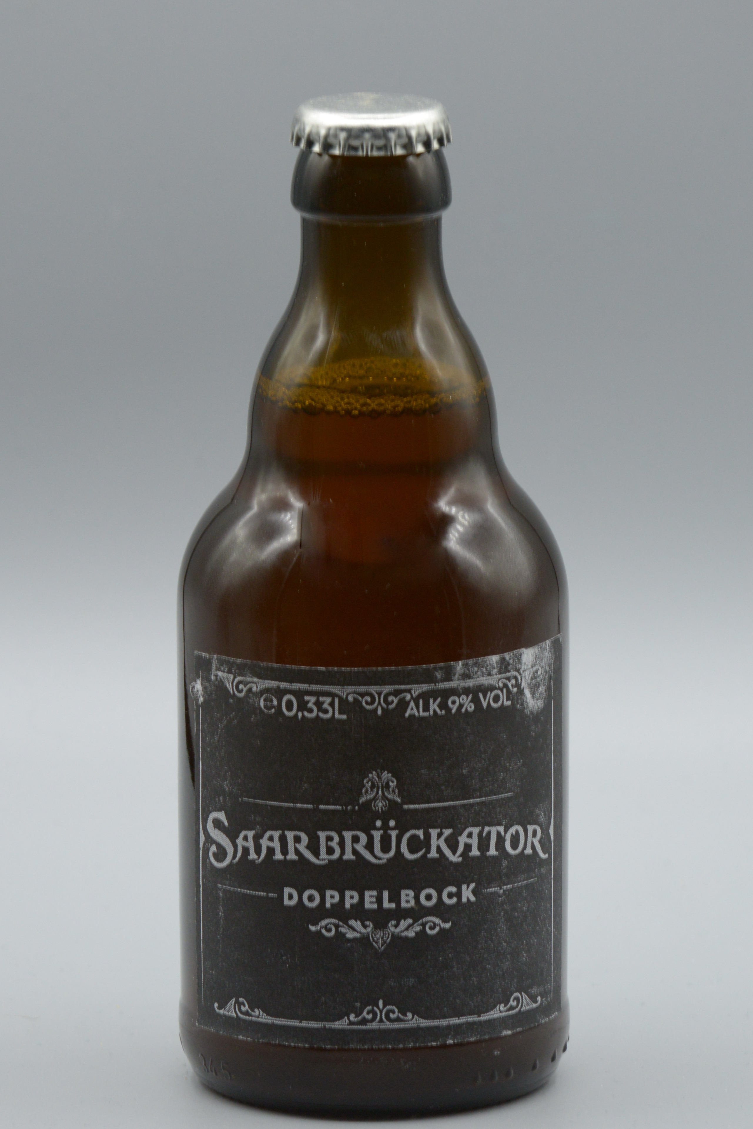 Saarbrückator Doppelbock in der Stubbi Flasche der Saarbrücker Beer Society in Zusammenarbeit mit der Brauerei G.A. Bruch (2018).